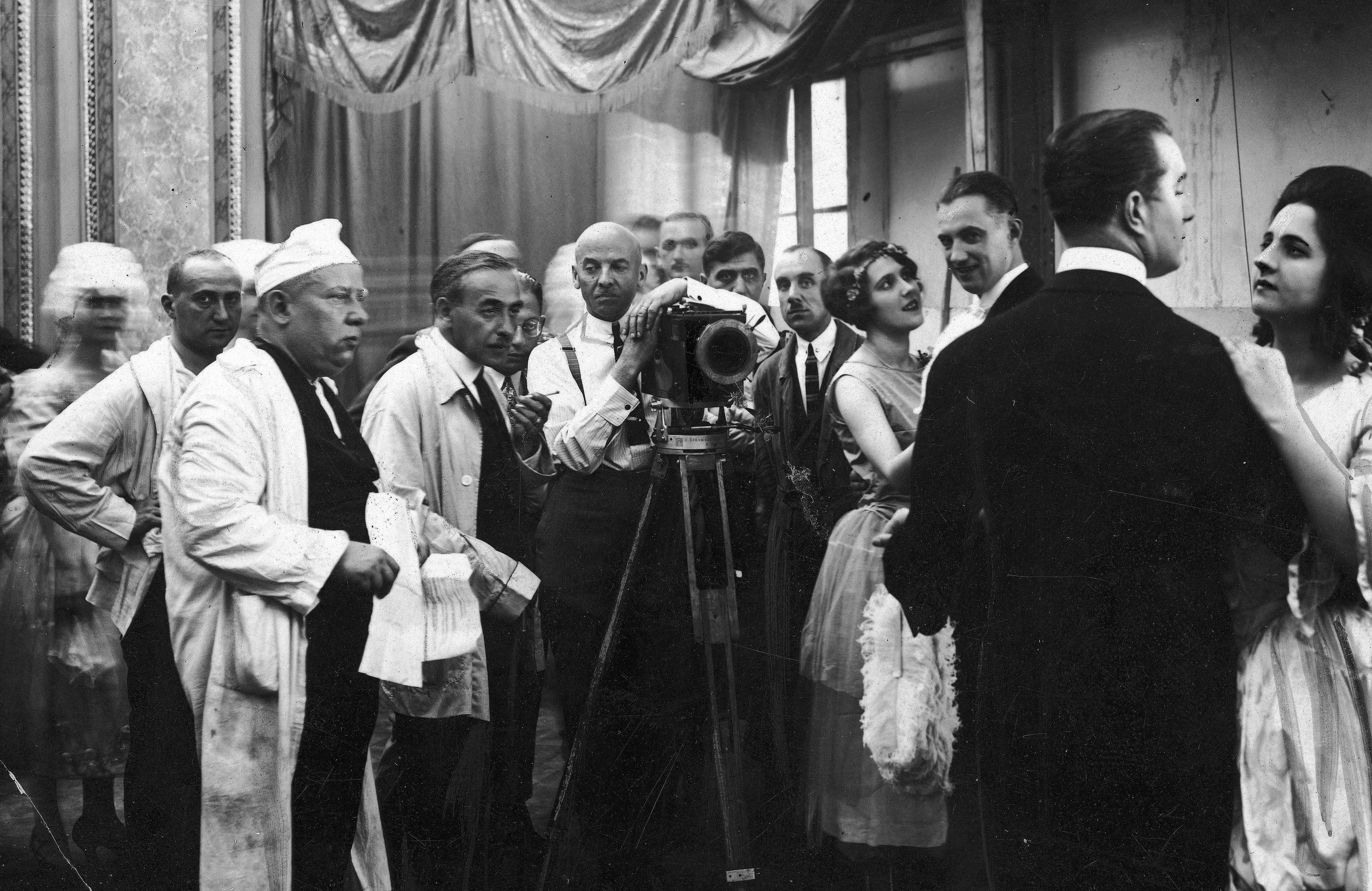 Scena z realizacji filmu Trędowata, 1926 r. Na pierwszym planie z prawej widoczni Bolesław Mierzejewski i Jadwiga Smosarska. Widoczni także m.in. reżyser Edward Puchalski i operator Zbigniew Gniazdowski.